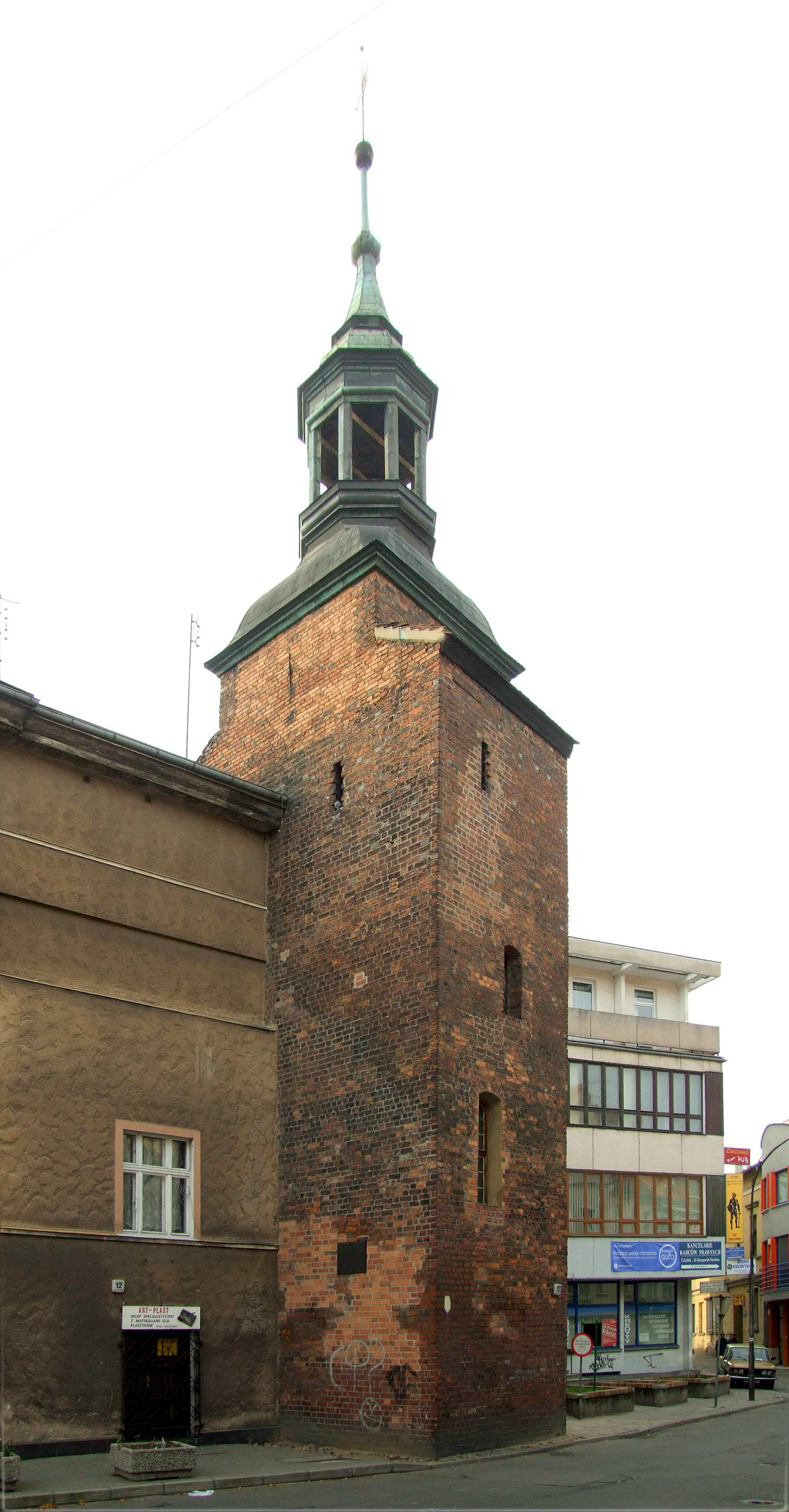 Wieża Łazienna (czasem także: "Łaziebna") w Zielonej Górze Autor: Mohylek 13:49, 2 November 2006 (UTC)